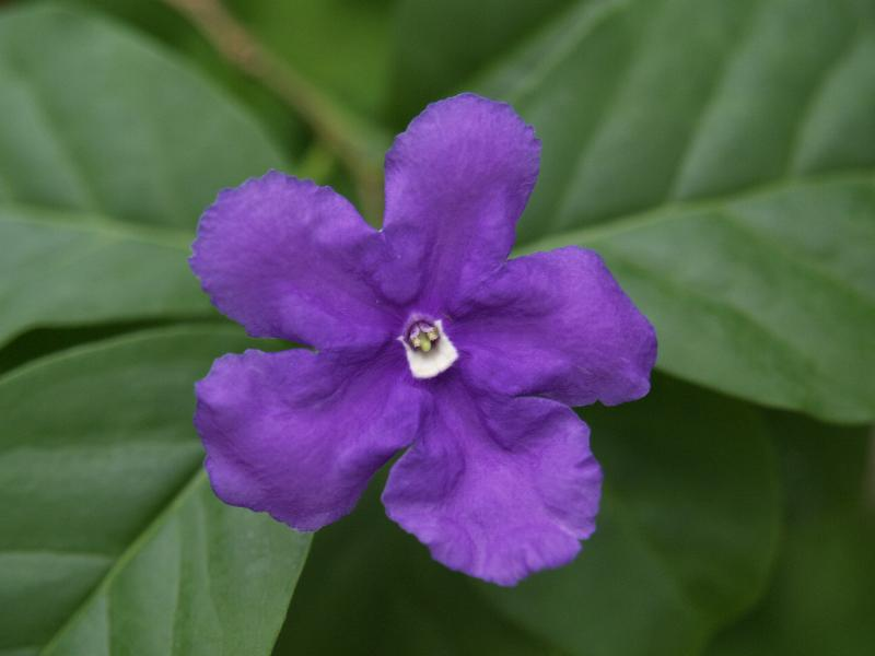 Brunfelsia pauciflora